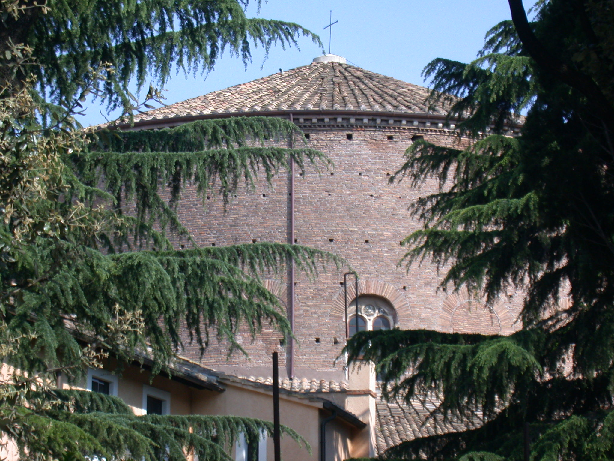 La chiesa di Santo Stefano Rotondo a Roma, scorcio da via della Navicella.